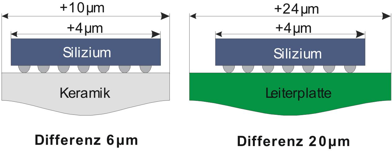 Physikalisch bedingte diverse Ausdehungskoeffizenten zwischen FR4, Aluoxid und Silizium